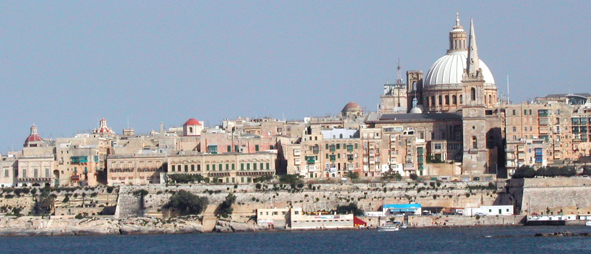 Valetta.